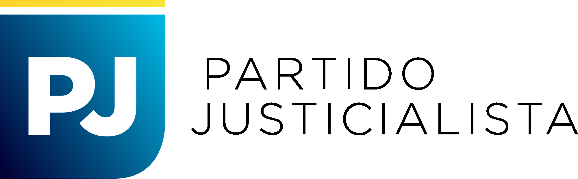 Emblema del Partido Justicialista. Utilizado aproximadamente desde 2018.